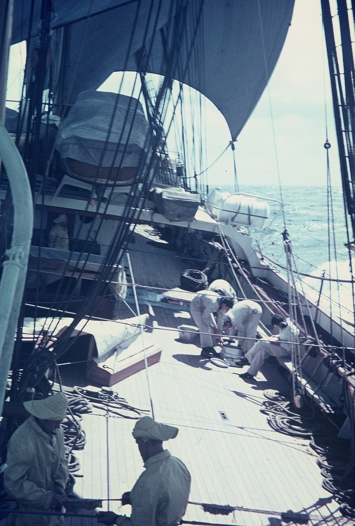 Strecktaue auf dem Segelschulschiff Gorch Fock